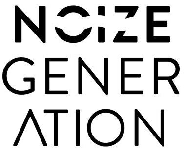 Logo des DJ Noize Generation